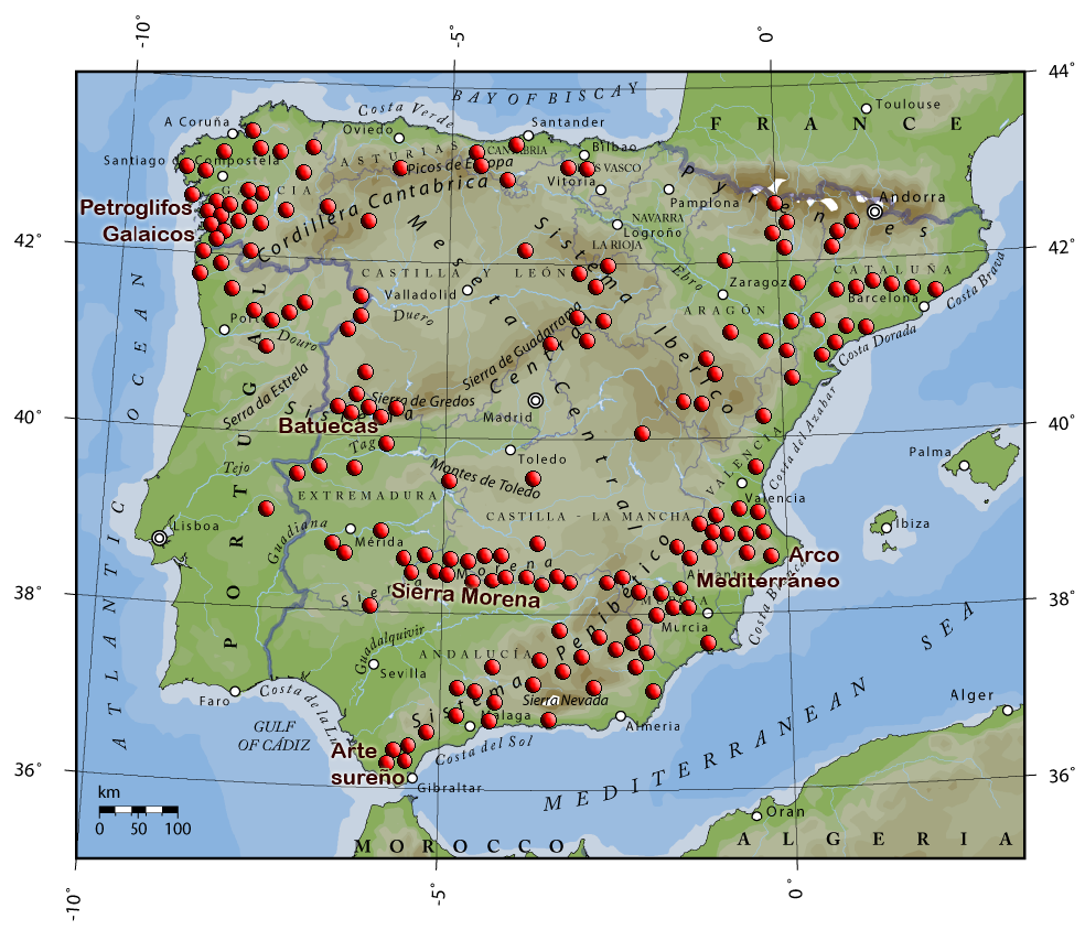 Localización de las principales estaciones con arte rupestre esquemático de la península Ibérica